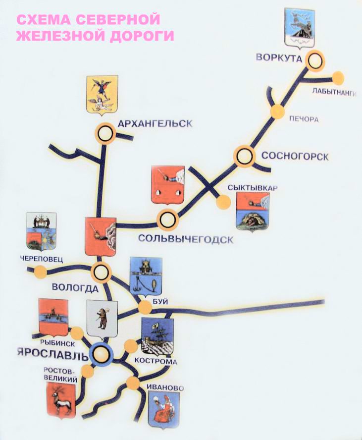 Схема Северной Железной Дороги